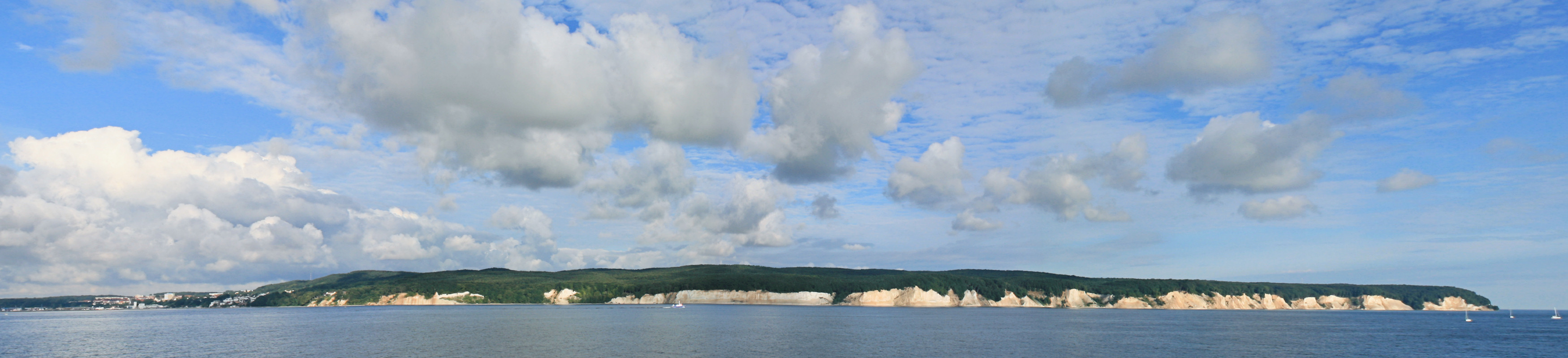 Kreideküste des Nationalparks Jasmund auf der Insel Rügen morgens vom Fährschiff „Trelleborg“ aus gesehen. Links liegt die Stadt Sassnitz und rechts der Ufervorsprung Kolliker Ort mit seinem kleinen Leuchtfeuer.